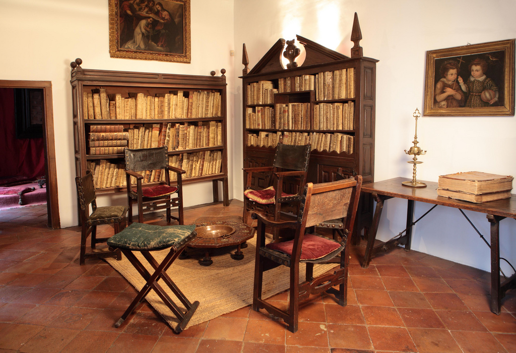 Estudio de Lope de Vega en la Casa Museo de Lope de Vega, en Madrid (España).